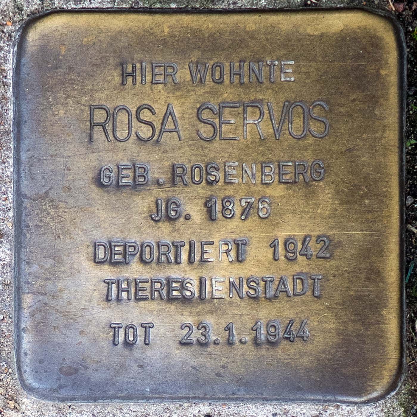 Stolperstein für Rosa Servos (Willich)